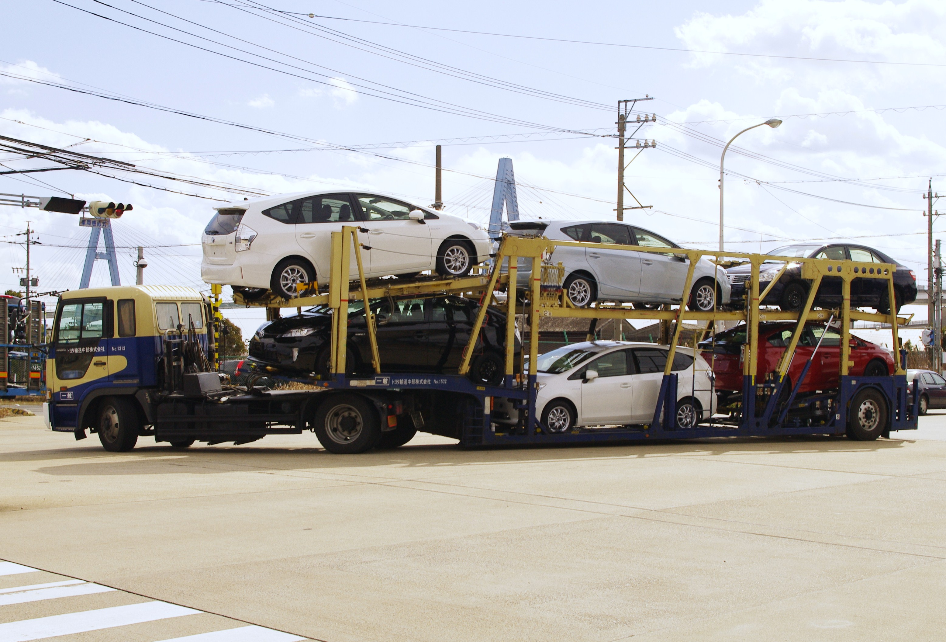 トヨタ輸送のキャリアカー